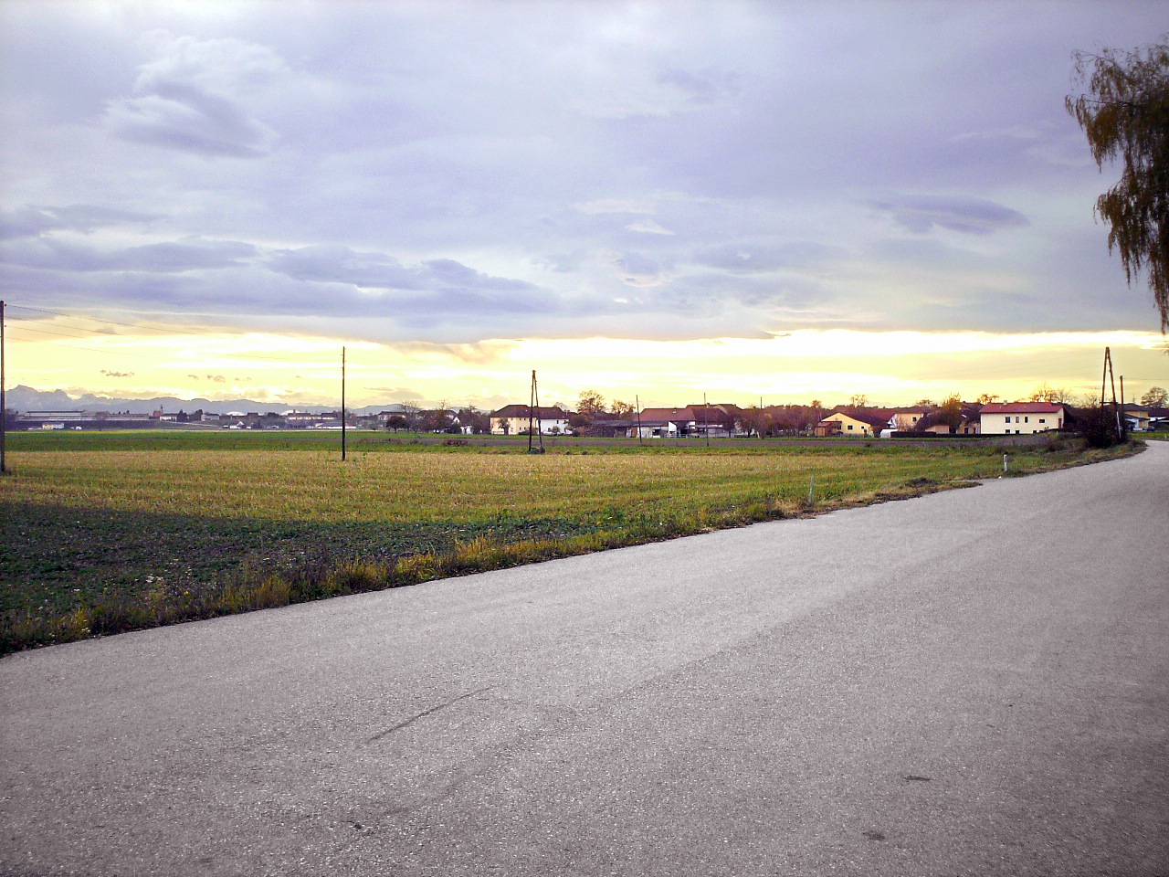 Blick aus NO auf das Areal des LL Albing, topographischer Zustand 2010.